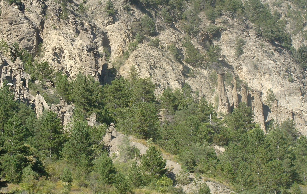 Une vue des "demoiselles coiffées" sur le flanc de la montagne qui domine Remollon côté nord.